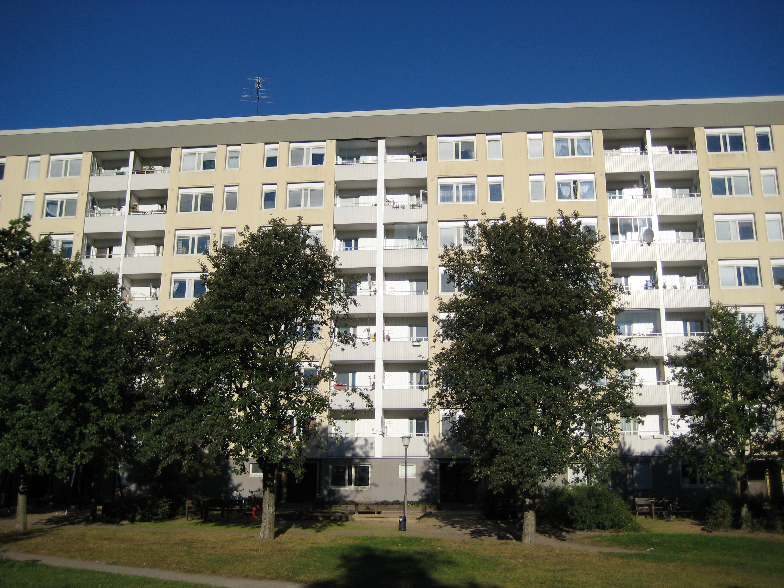 Fasad på ett av Bredängs stora skivhus.